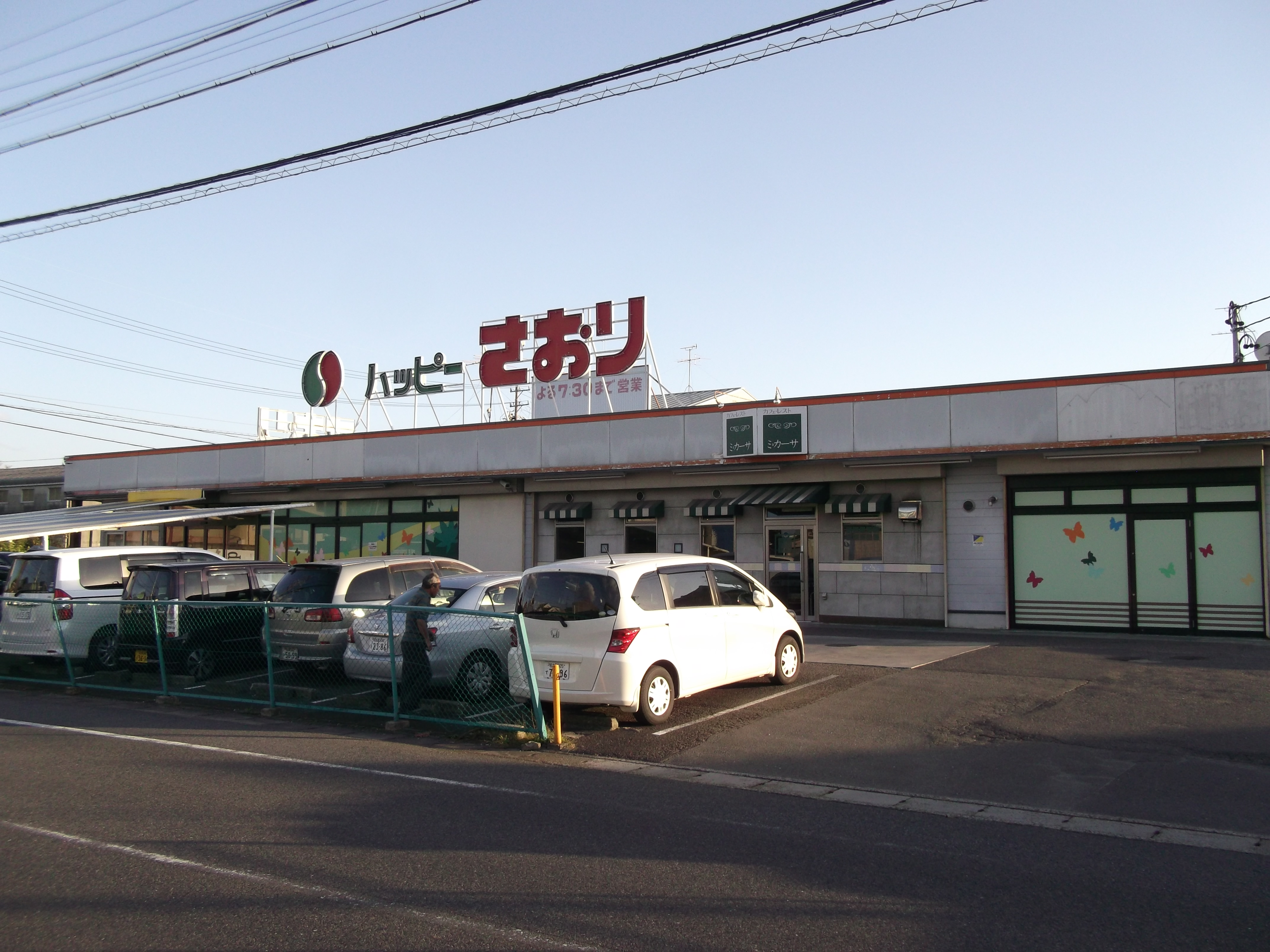 愛西市町方町にあるスーパーマーケットハッピーさおりを北側から写す